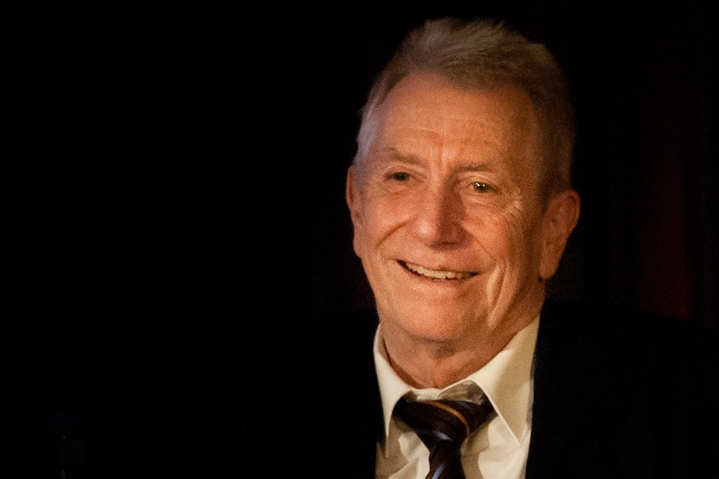 Wolfgang Gehrcke (2013)